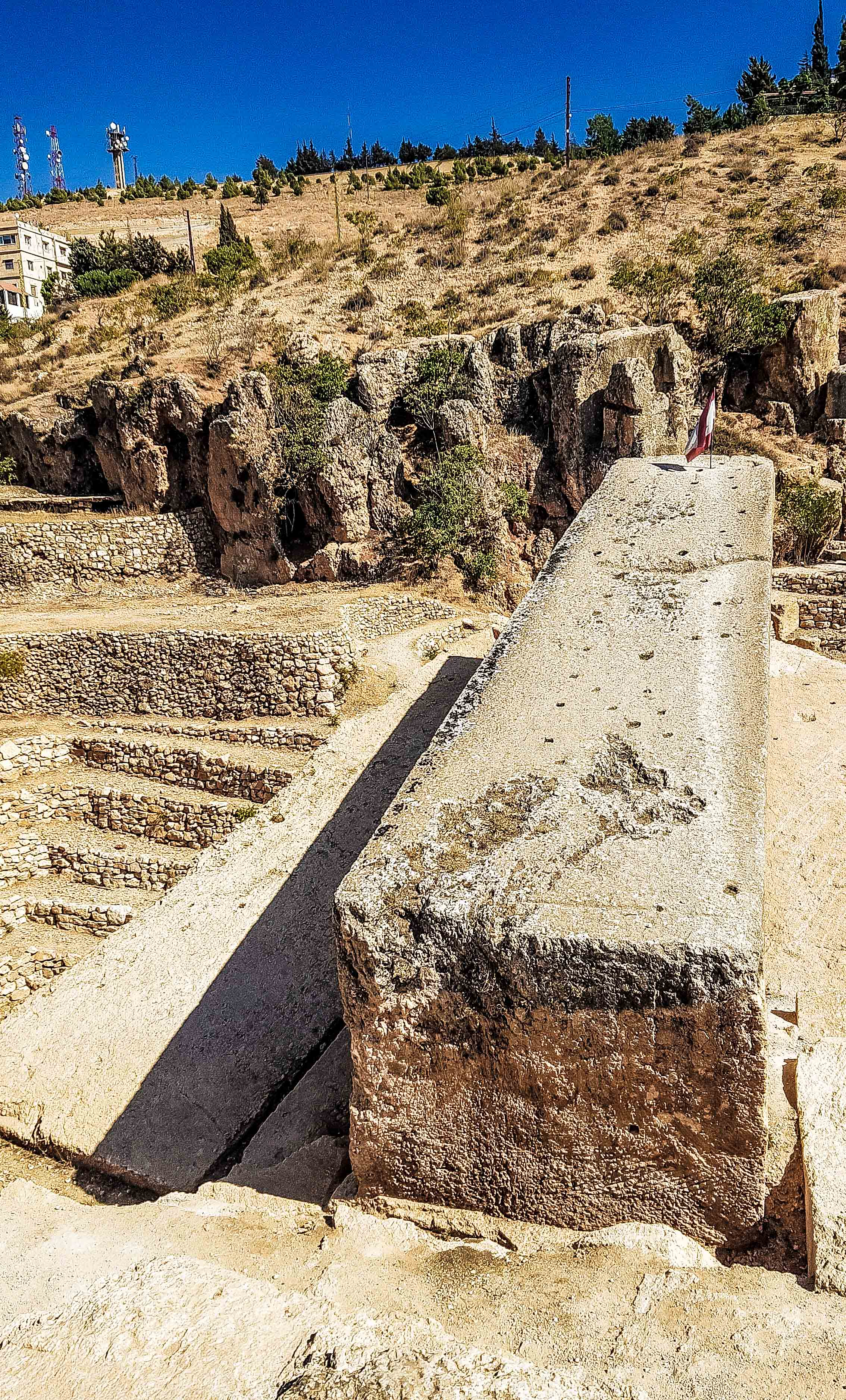 Links in der Erde liegt der größte Monolith der Welt